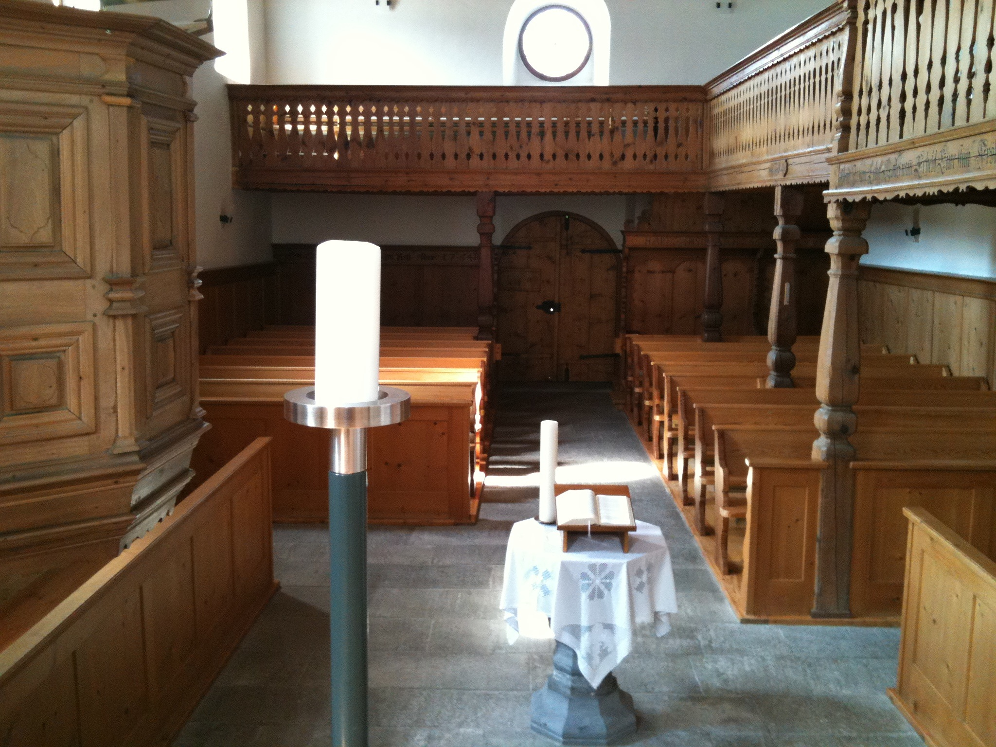 reformierte Kirche Trimmis (Kanton Graubünden), Blick aus dem Chor in das Schiff